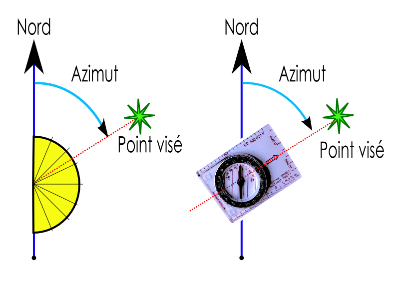 Utilisation d'une boussole, le principe de l'azimut Auteur/Author Romary avril/April 2006